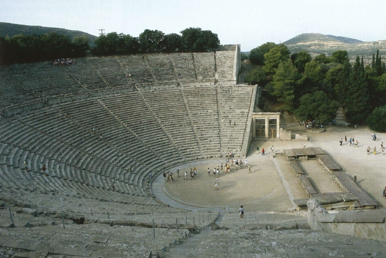 Divadlo v Epidauru, aktuálny stav